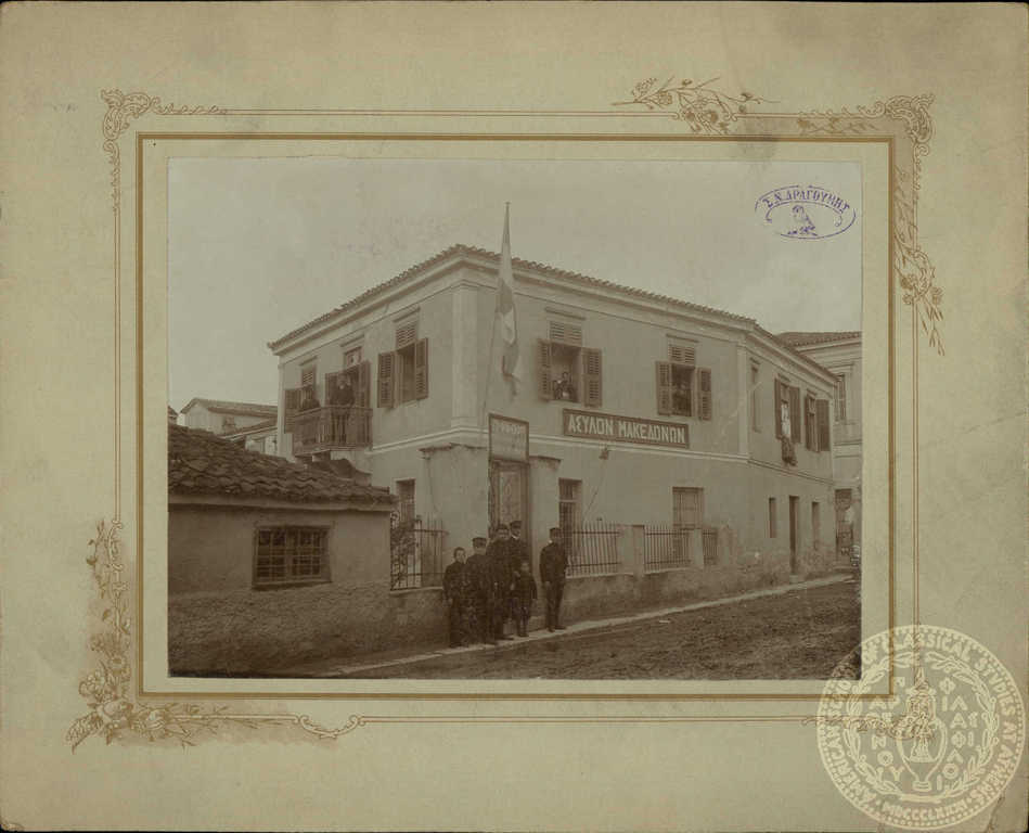 Силогосът "Македонско убежище"